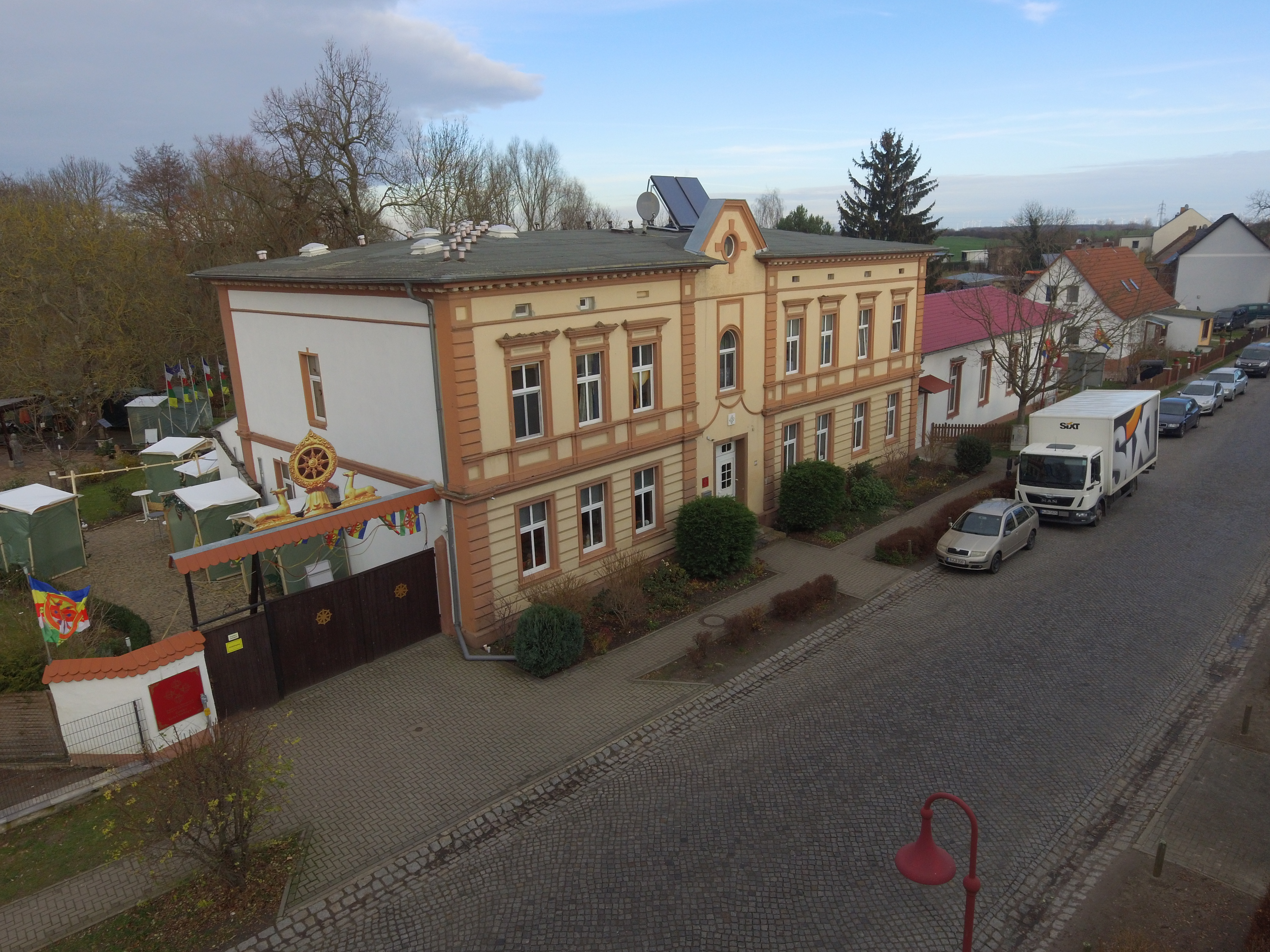 Buddhistisches Kloster Päwesin